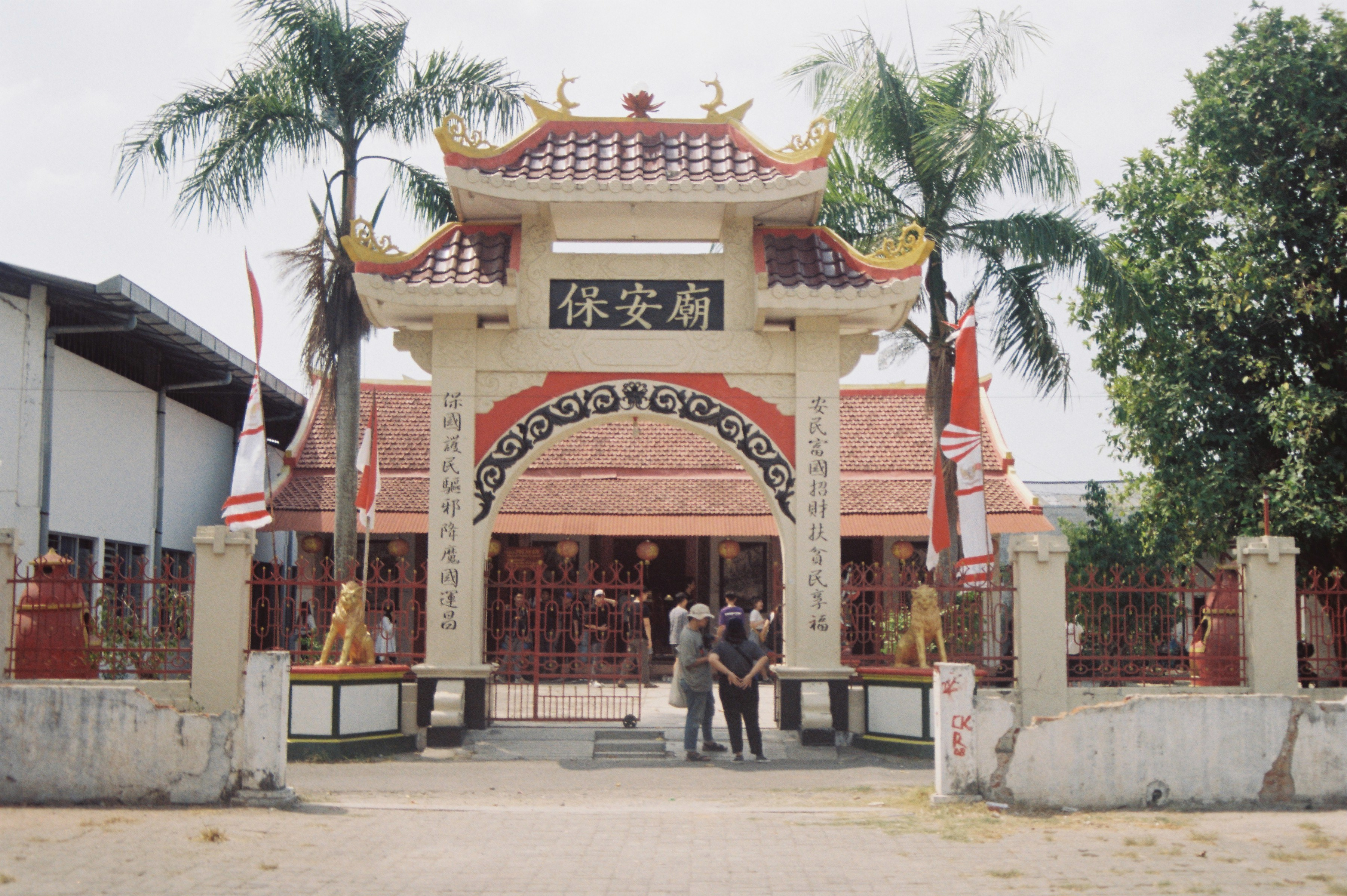 Salah satu saksi bisu sejarah akulturasi panjang di kota Lasem. Merupakan salah satu kelenteng tertua di daerah Lasem.